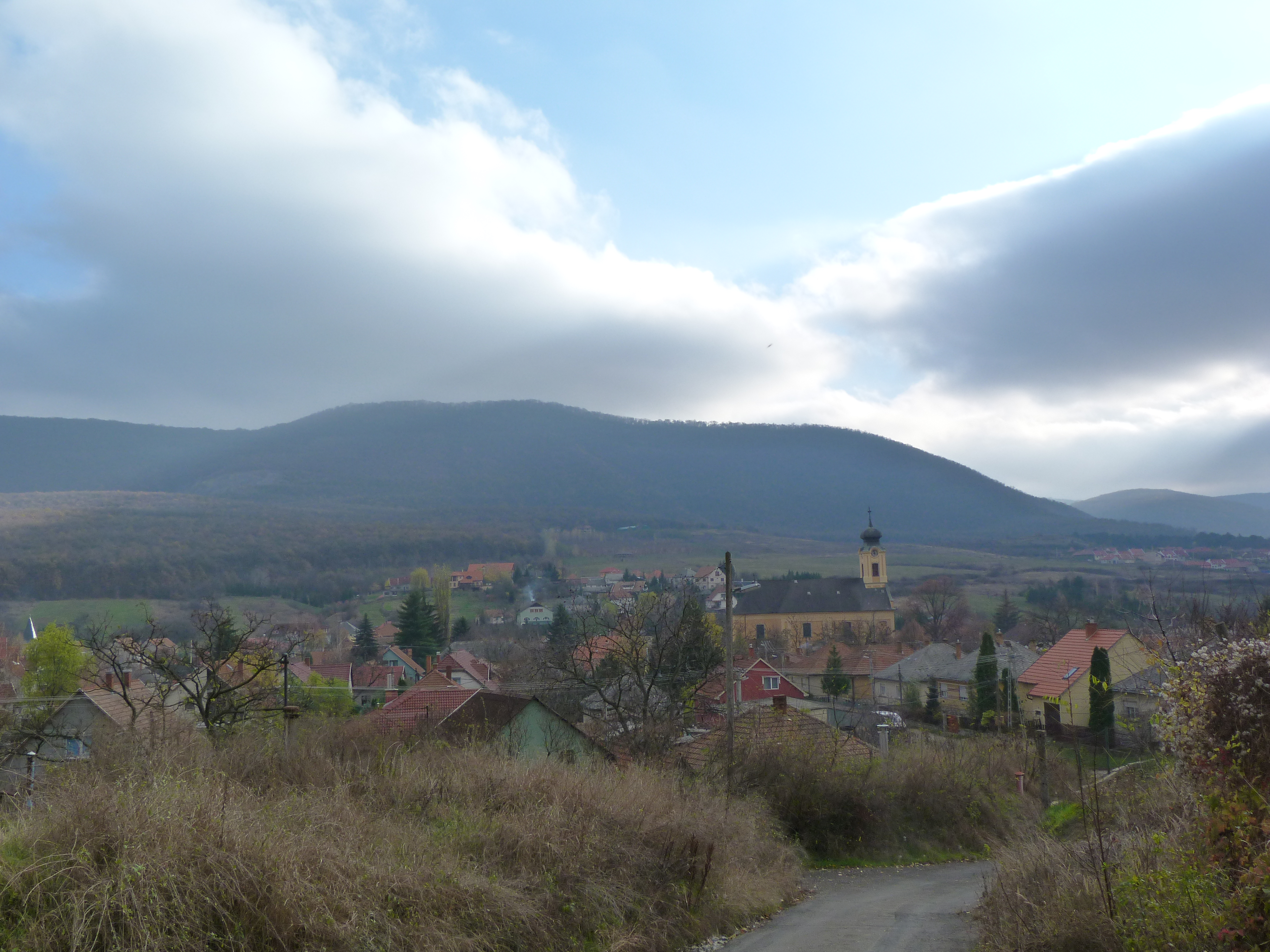 A felvétel 2013. november 20 -án szerdán készült Felsőtárkányban. ©© Derzsi Elekes Andor, Budapest, 2013, You are authorised to use these photos and vids under Creative Commons – even for commercial, for profit purposes. Photos must be attributed to Derzsi Elekes Andor. All of the photos and vids in the Metapolisz DVD line are under Creative Commons and can be used even for commercial – for profit – purposes. Recommended Citation Derzsi Elekes Andor: Metapolisz DVD line